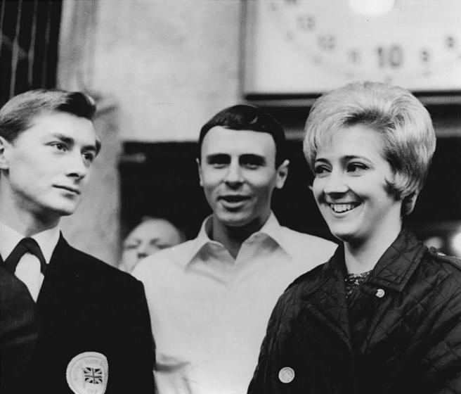 Emmerich Danzer, Diana Towler, Bernard Ford Zentralbild Gahlbeck 24.3.1966 Karl-Marx-Stadt: Eiskunstlaufen-Internationales Schaulaufen Weltmeister stellen sich vor. Bei dem traditionellen Frühjahrsschaulaufen des DELV stellen sich mit Emmerich Danzer (Österreich, Mitte) und dem Tanzpaar Diana Towler-Bernard Ford (Großbritannien) gleich zwei Titelträger der Davoser Weltmeisterschaften vor. Der Abschluß der Eiskunstlauf-Saison findet am 23. und 24. in Karl-Marx-Stadt (unser Foto) und am 26. und 27.2.1966 in Berlin statt.